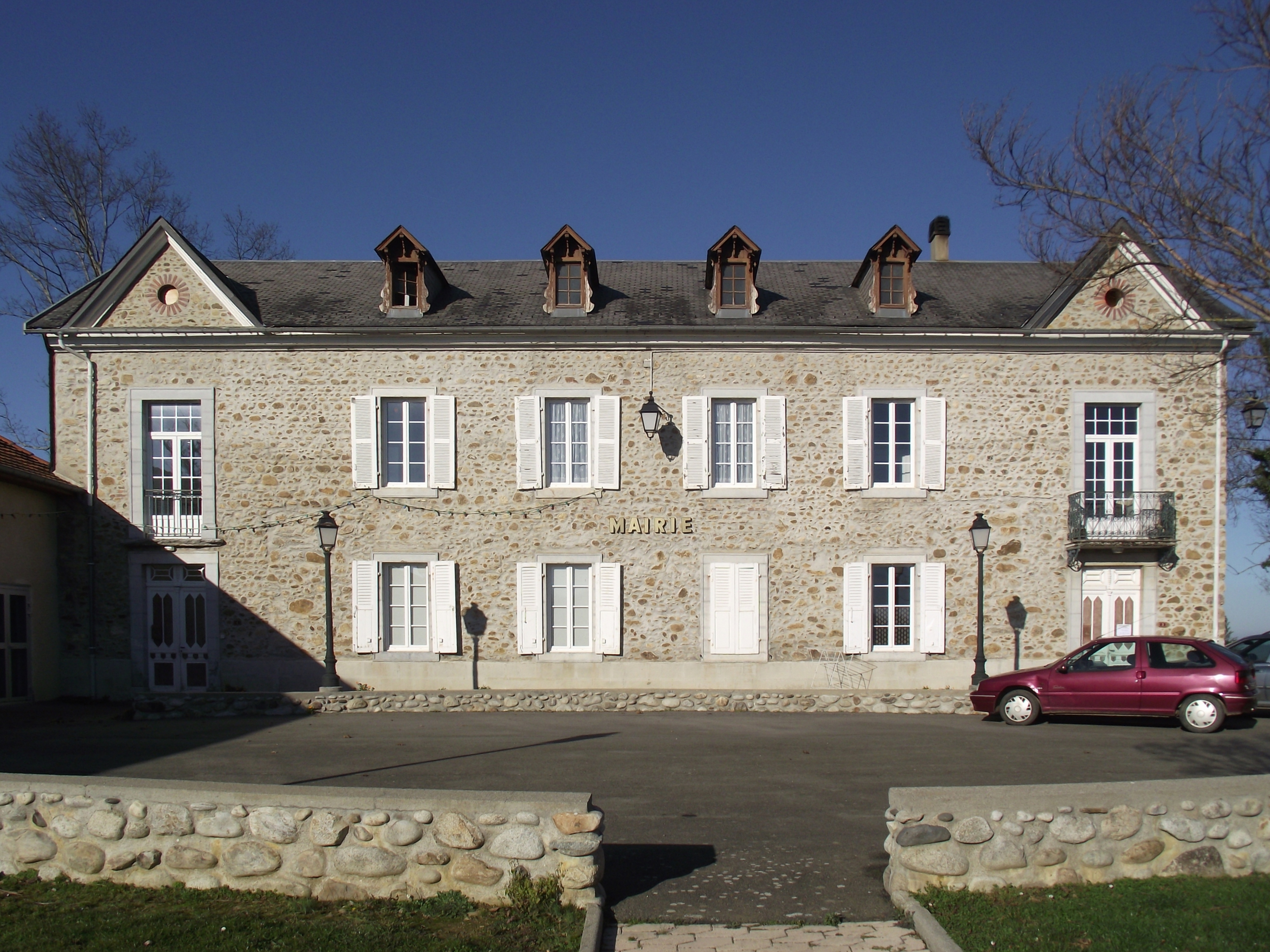 Mairie de Poumarous (Hautes-Pyrénées, France)